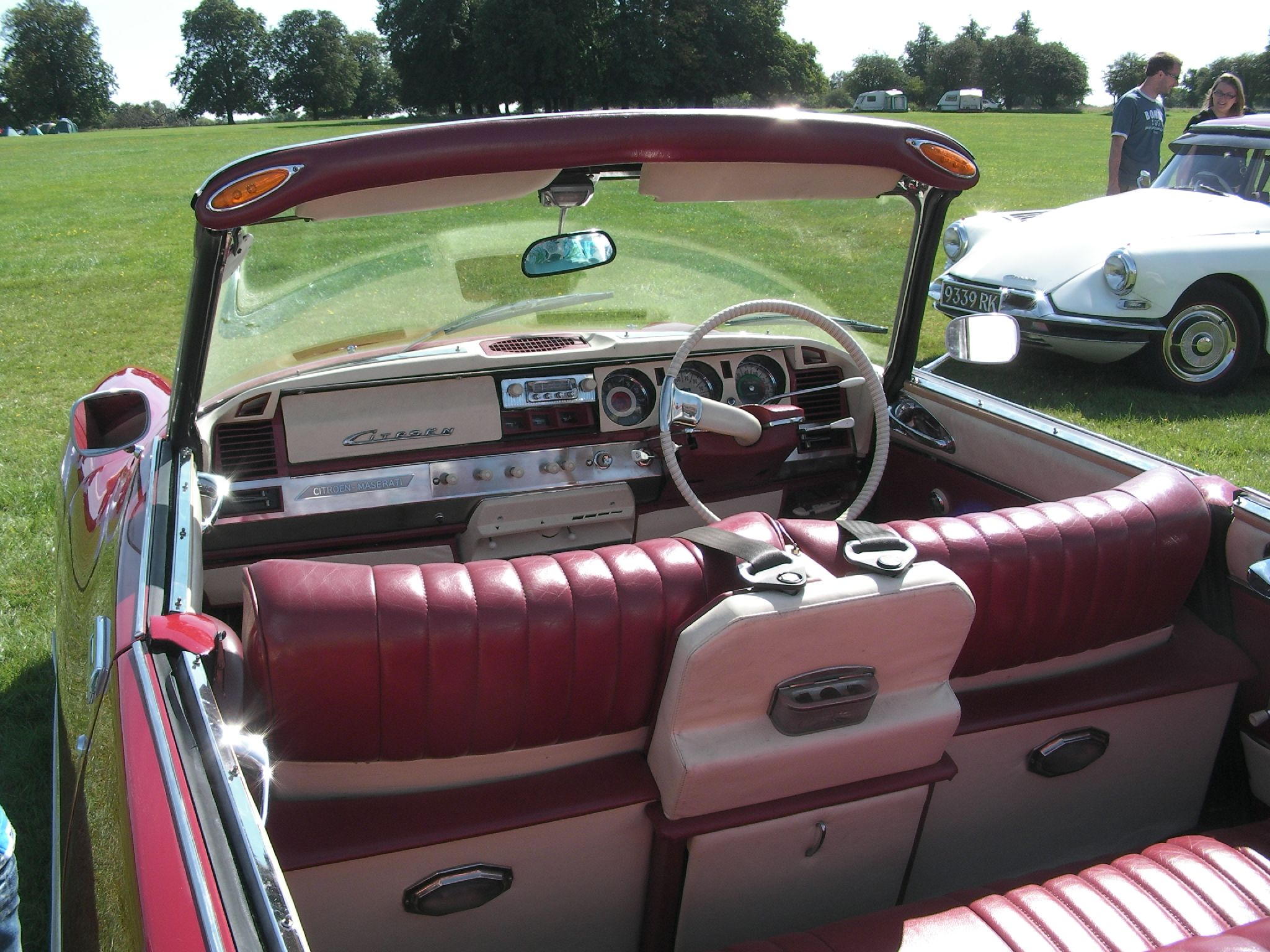 Citroen DS convertible